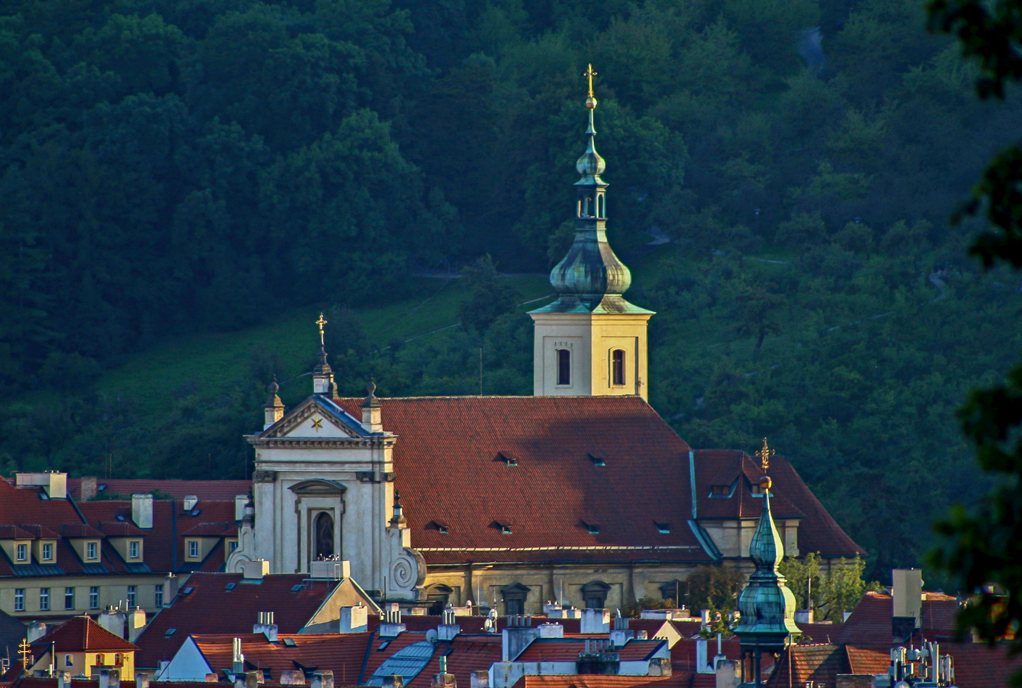 Pohled na Staré Město z Letné